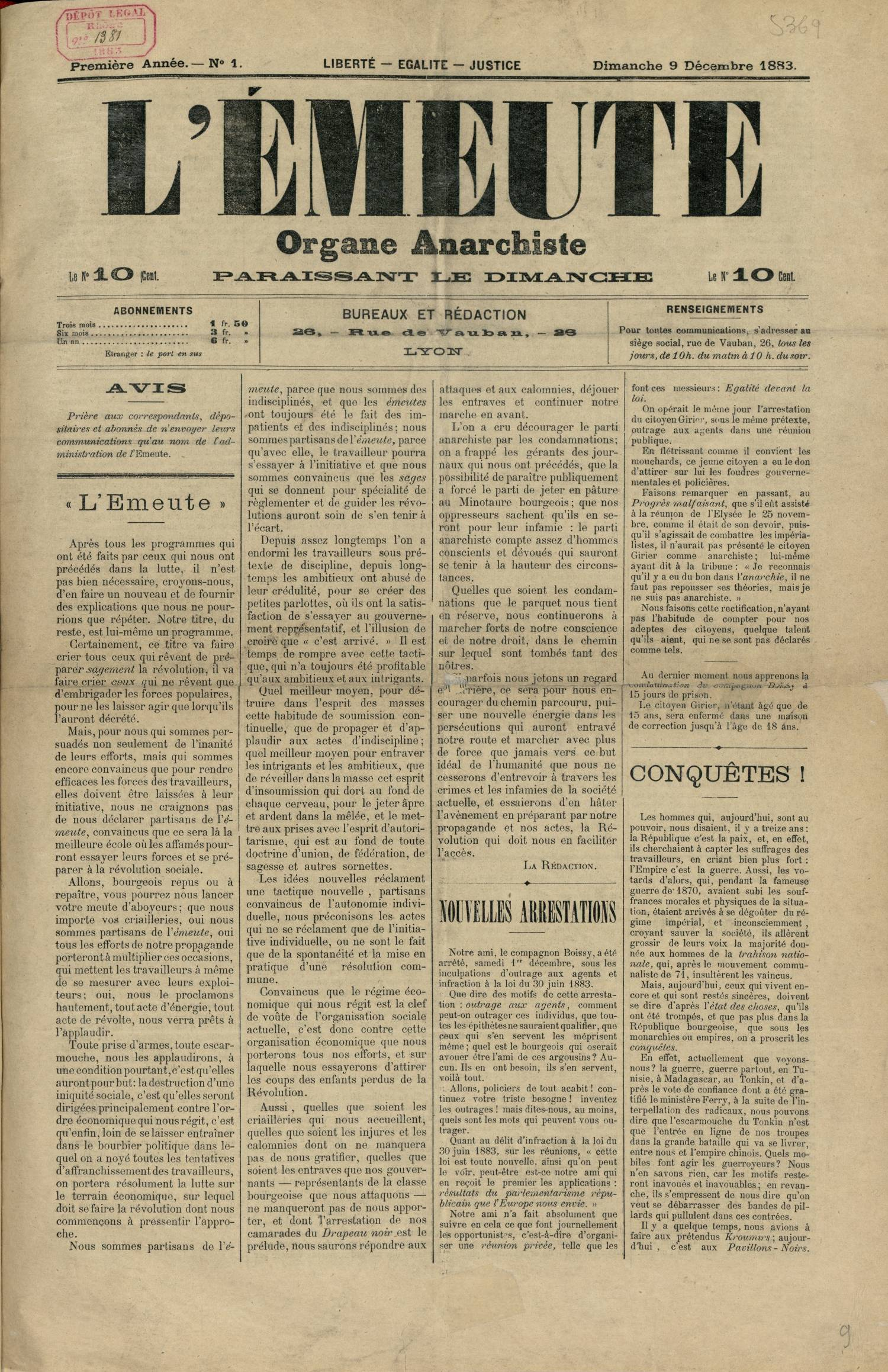 L’Émeute, organe anarchiste : 7 numéros publiés entre décembre 1883 et janvier 1884.